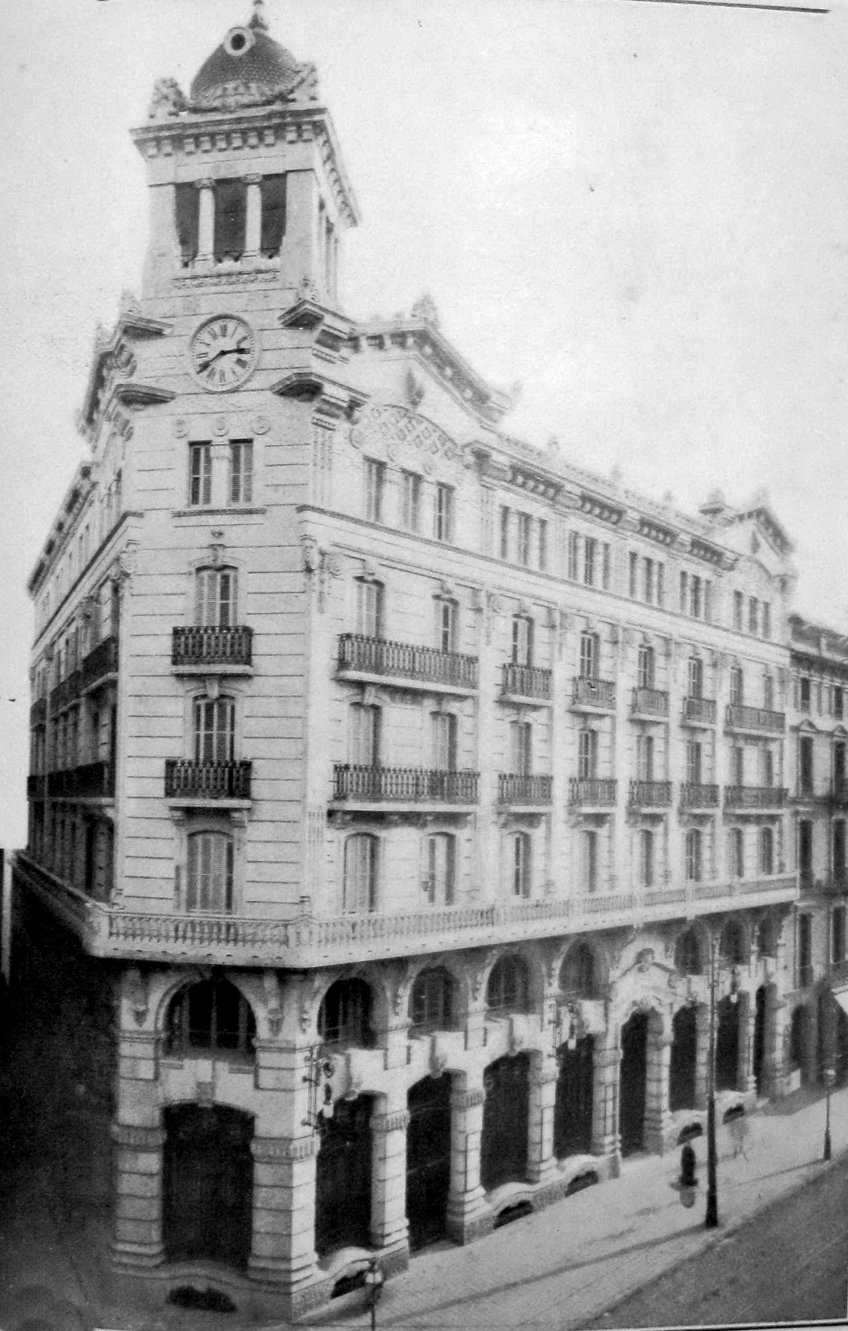 Edifici pel Banc Hispno-americano al carrer Fontanella (Barcelona, Catalunya). Obra de Miquel Madorell i Rius de 1912.